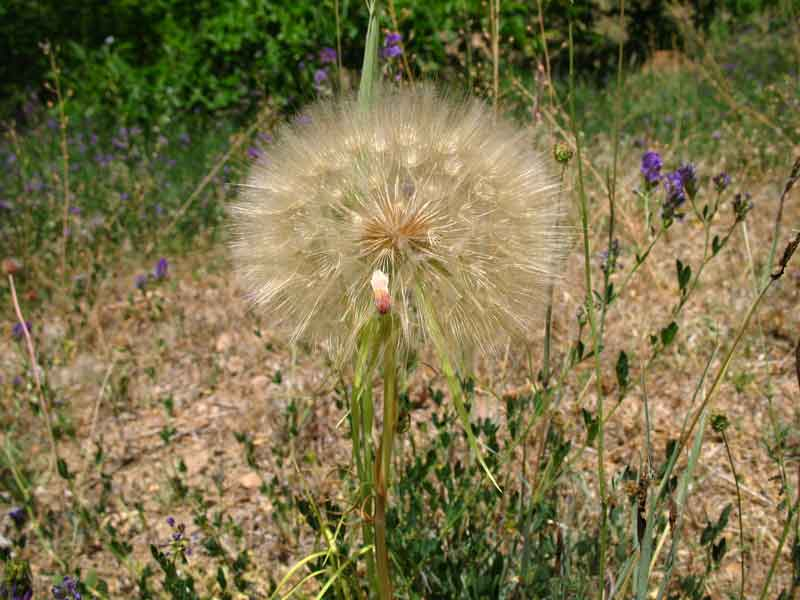 سرمشک